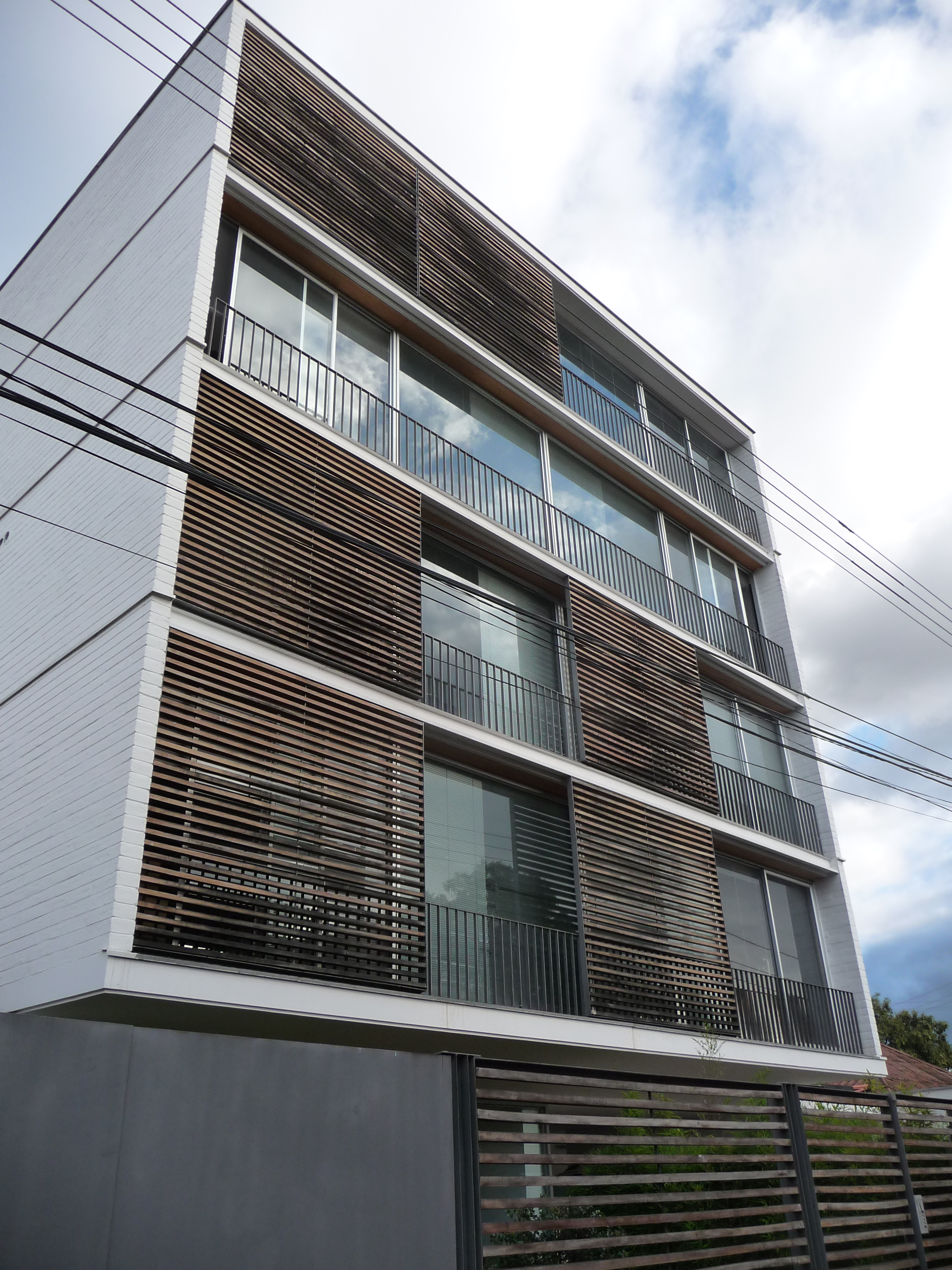 Obra de María Augusta Hermida y Javier Durán